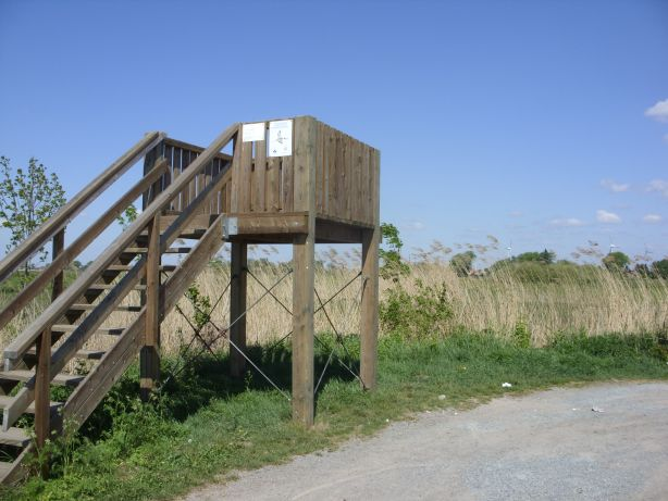 Naturschutzgebiet Ochtumniederung bei Brokhuchting, Aussichtsplattform (Brokhuchtinger Landstraße)